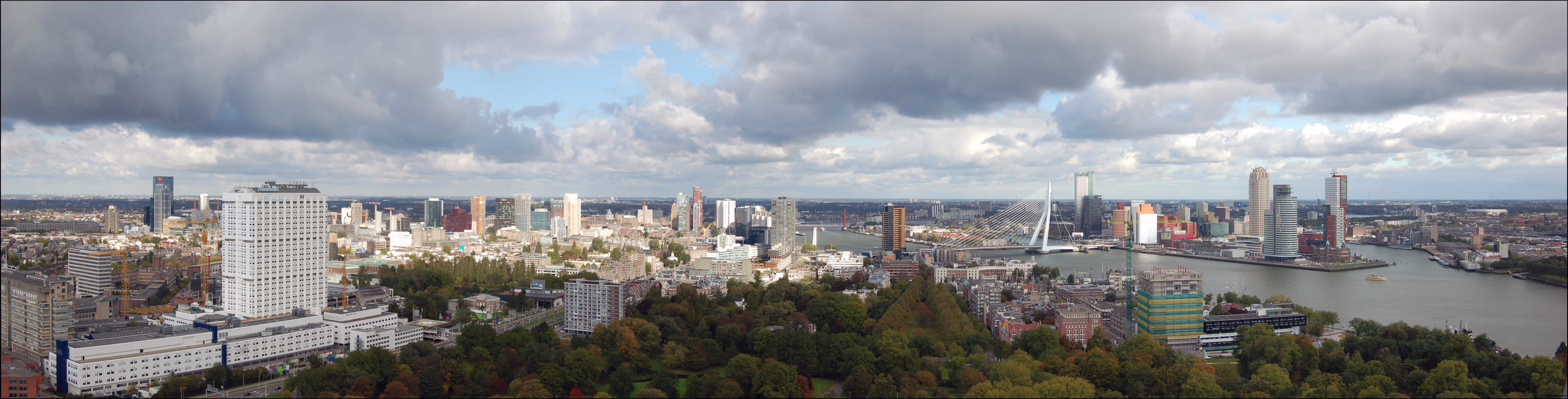 Best viewed in large.